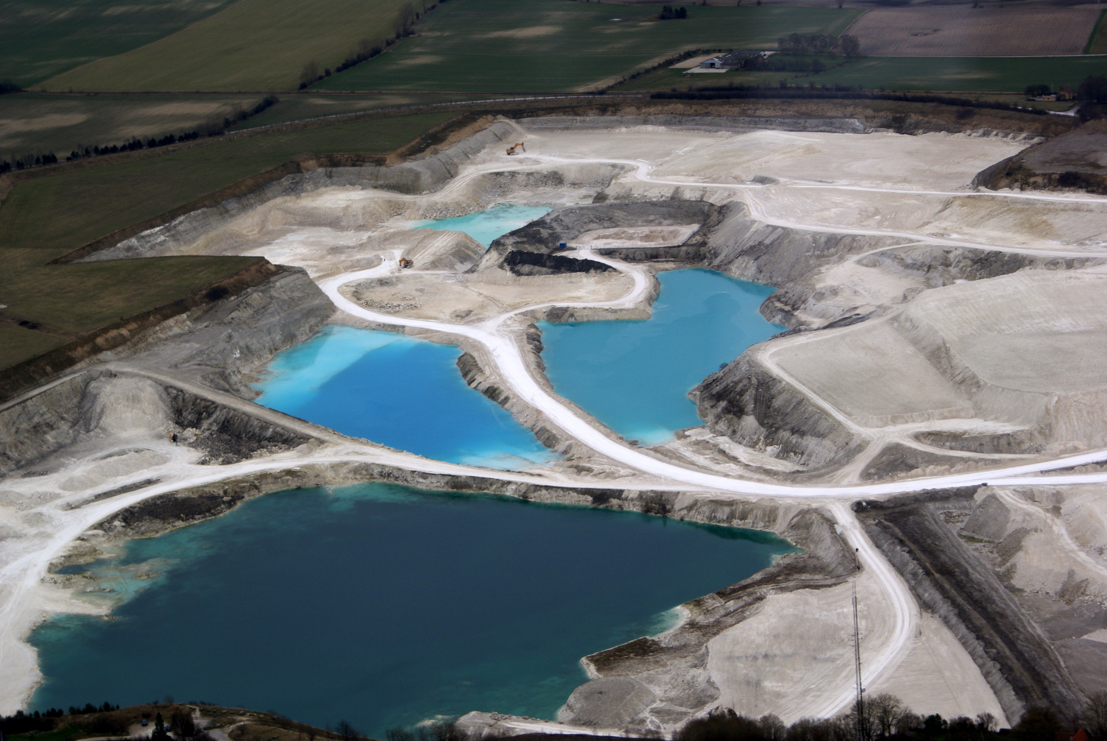 Fakse Kalkbrud